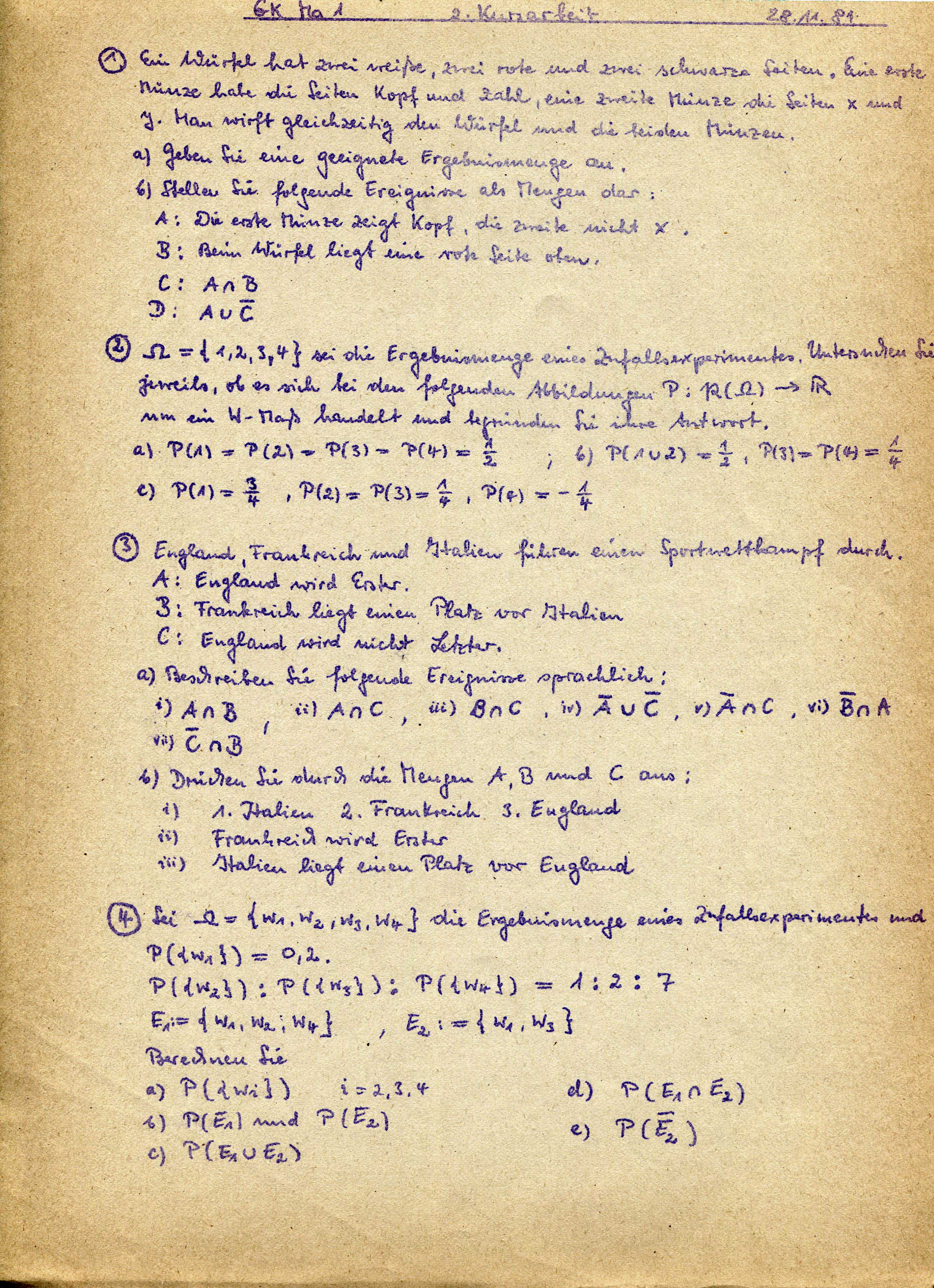 Klassenarbeit Mathematik Gymnasiale Oberstufe der 80er Jahre